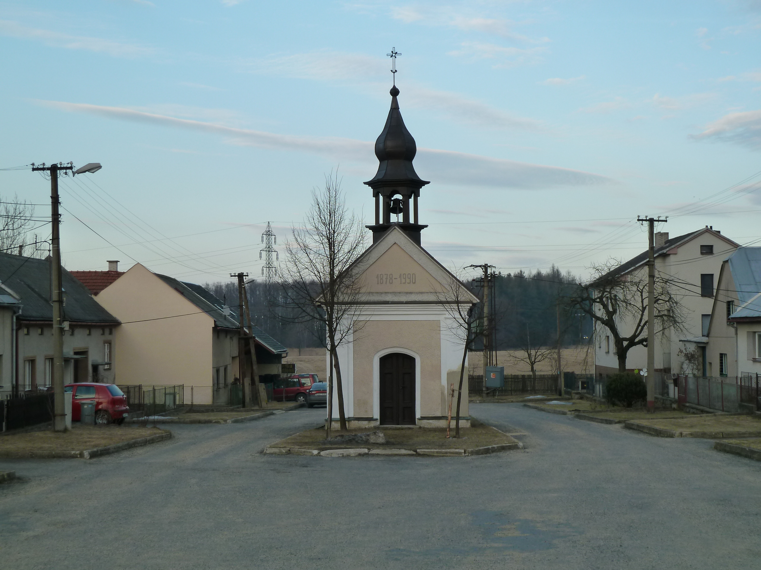 Kaplička Radonín